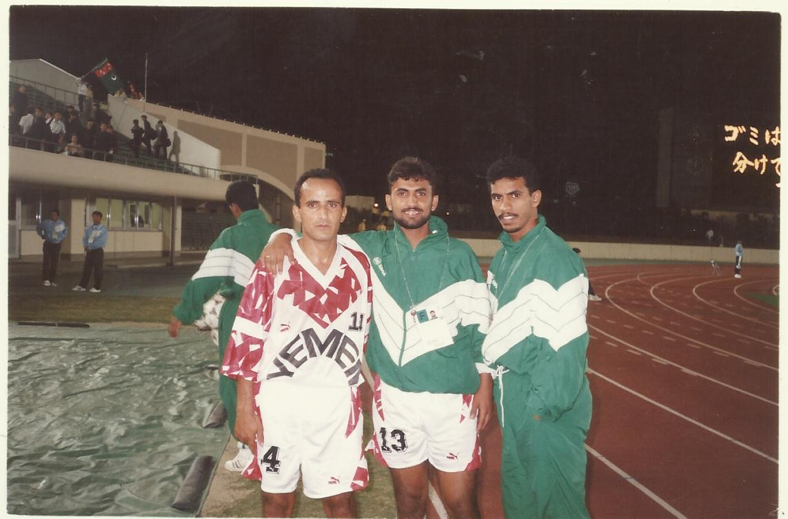 صورة الكابتن اسعد محمد عبده مع الكابتن خالد عفارة والكابتن ابراهيم الصباحي في بطولة الألعاب الآسوية التي أقيمت في مدينة هيروشيما عام 1994 م